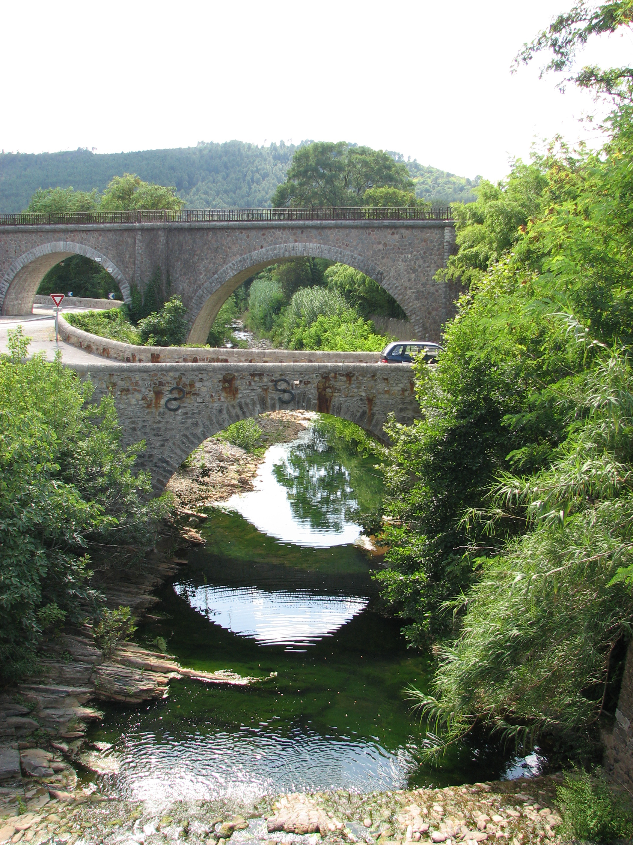 Ponts ferroviaire et routier au-dessus de l'Amous, affluent du Gard ou Gardon. Vue vers l'ouest et vers l'aval, depuis un deuxième pont routier en amont de ces deux ponts. La confluence de l'Amous avec le Gard est à 360 m en aval du pont ferroviaire. Hameau de Maguielle immédiatement à droite de la photo, hameau de Coudoulous à gauche. La bambouseraie d'Anduze, en bordure de l'Amous, est sur la droite derrière le pont de chemin de fer.